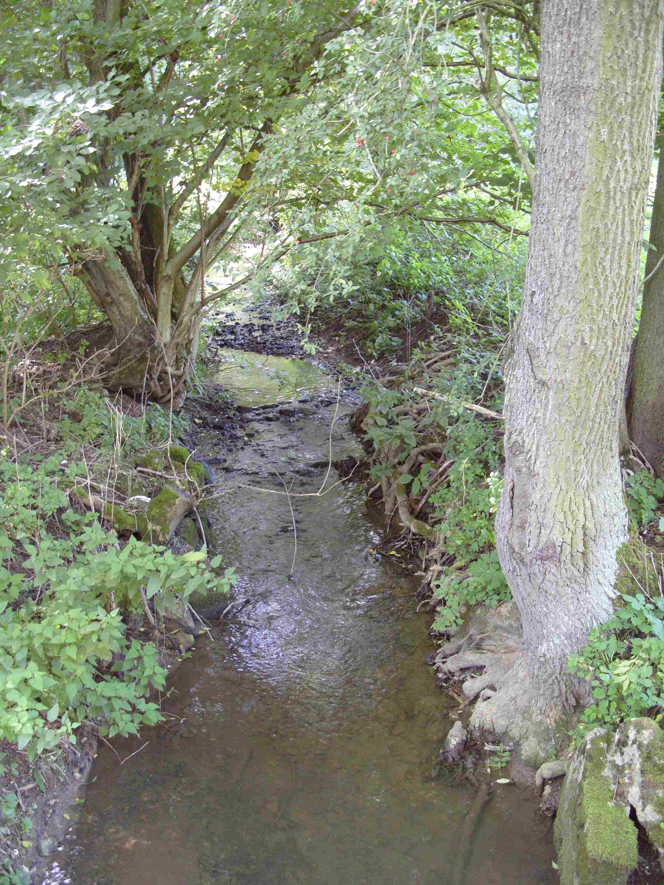 Gönnerbach im Nerkewitzer Grund